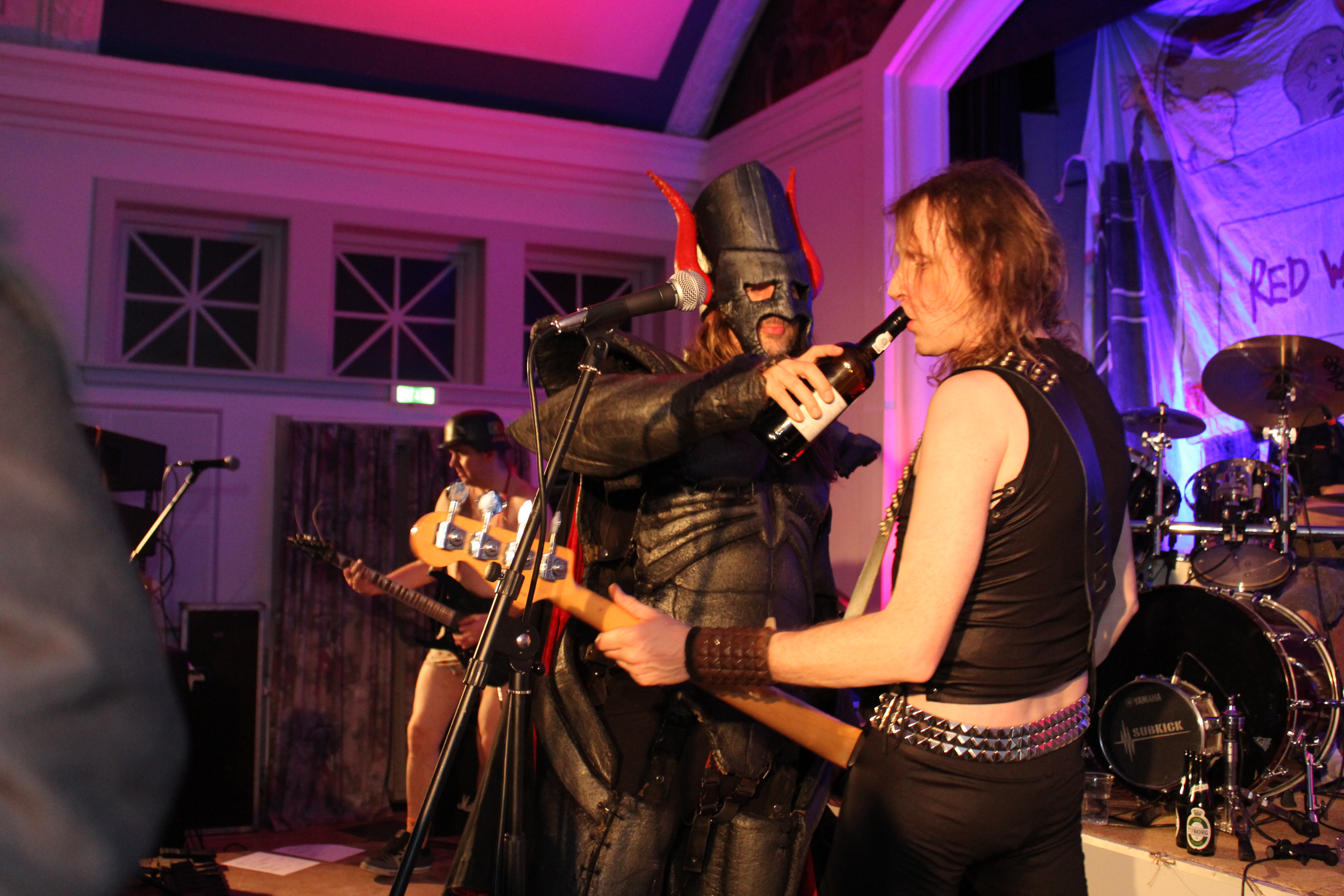 Det danske band Red Warszawa. De spillede i Musikforeningen Brage, Jyderup d. 6. december 2013